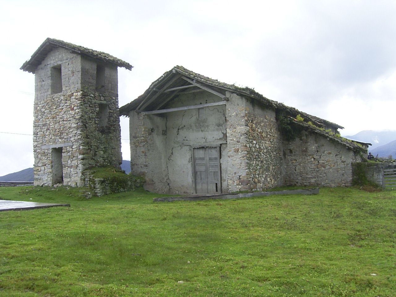 La piedra iglesia del pueblo Chiliquin — Provincia de Chachapoyas, Amazonas (region), Peru.